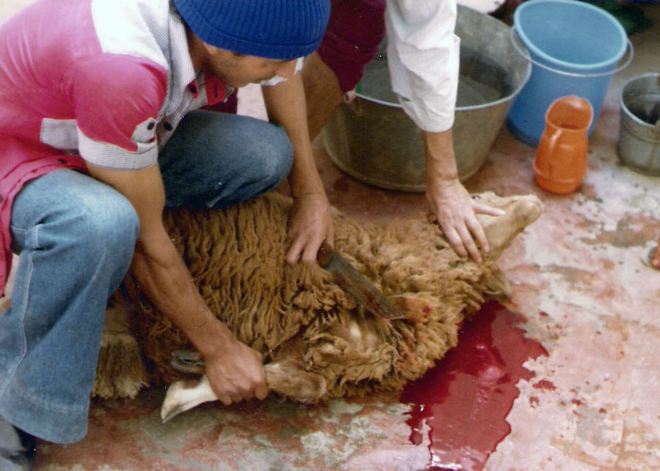 Walon: sgoziyaedje do bedot al fiesse di l' ofrixhaedjeلمغربية: كيدبحو لحولي فعيد لكبيرWalon: Egorgement du mouton de l'aïd